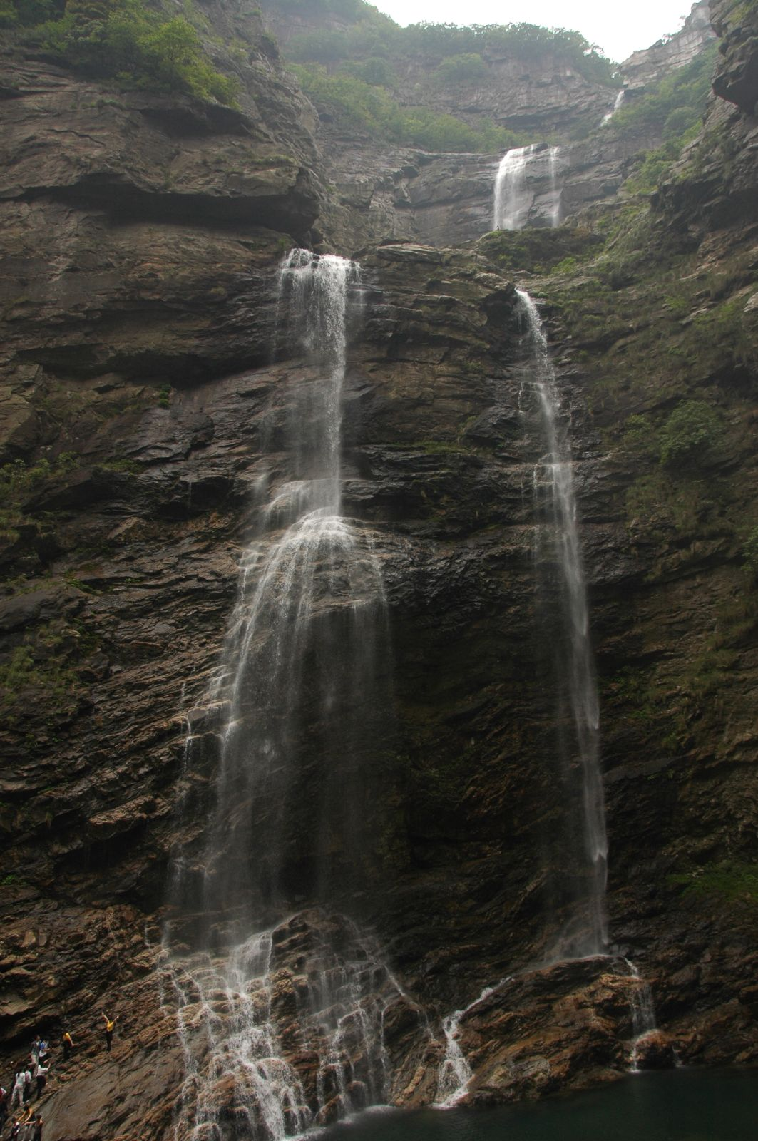 Lu Shan, Jiangxi, China